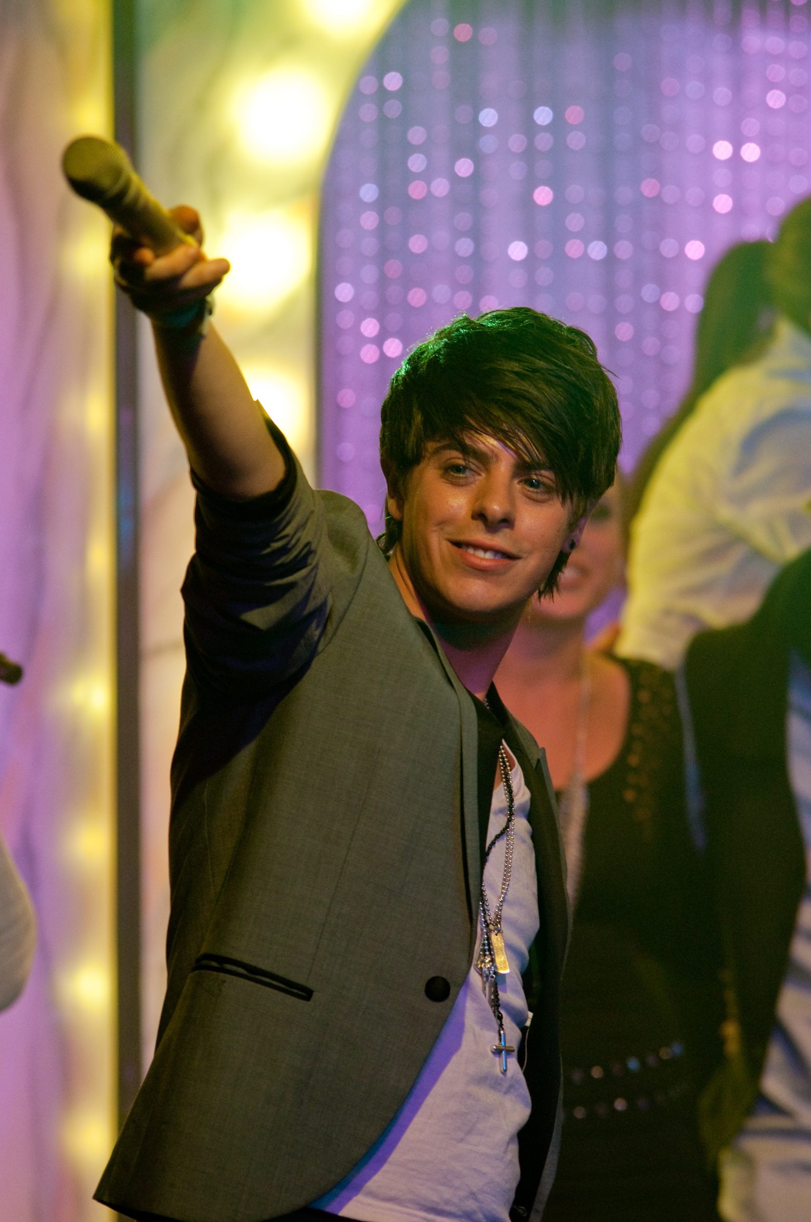 Kevin Borg 2009